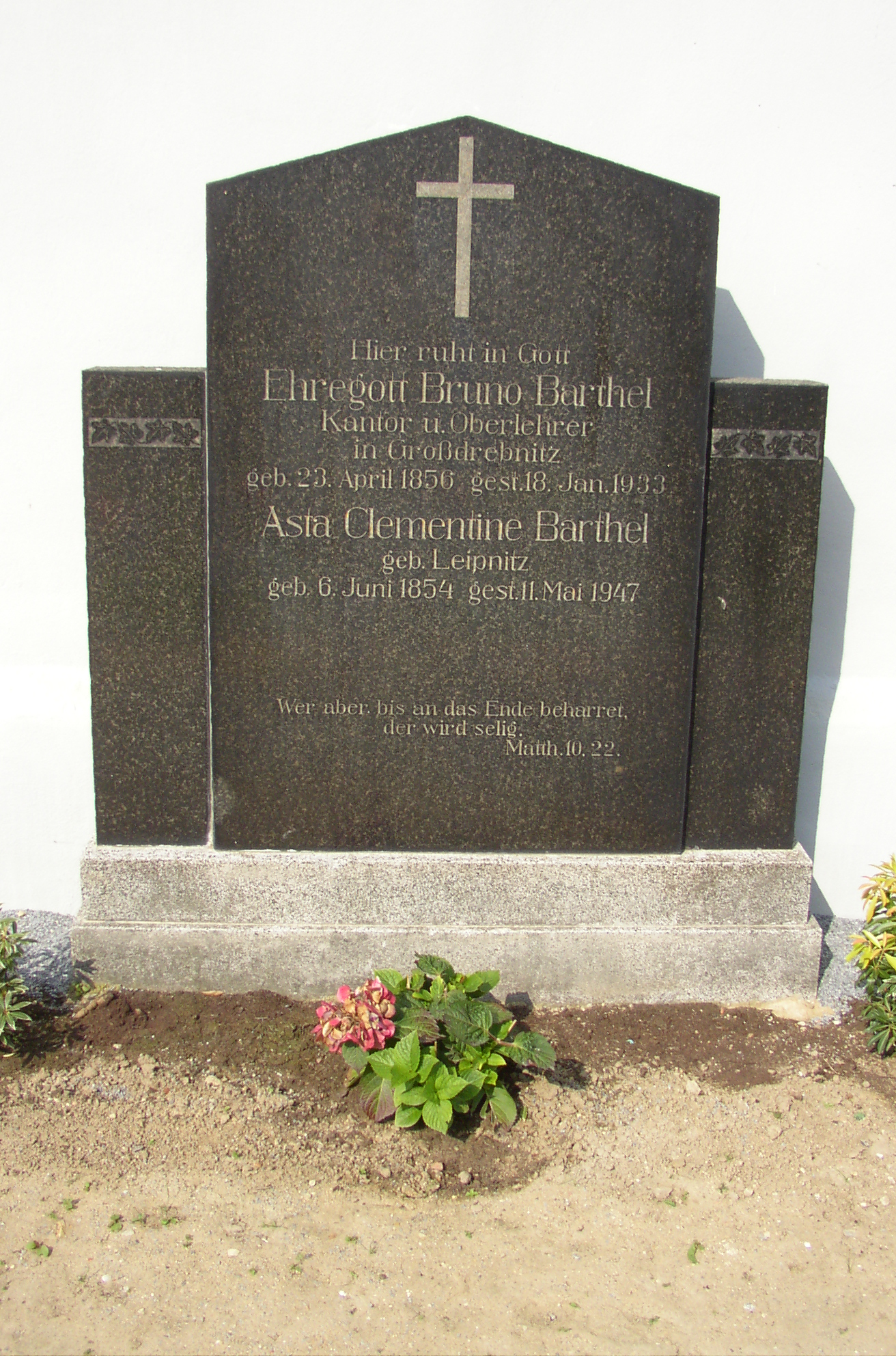 Grabstätte Bruno Barthel auf dem Friedhof Großdrebnitz